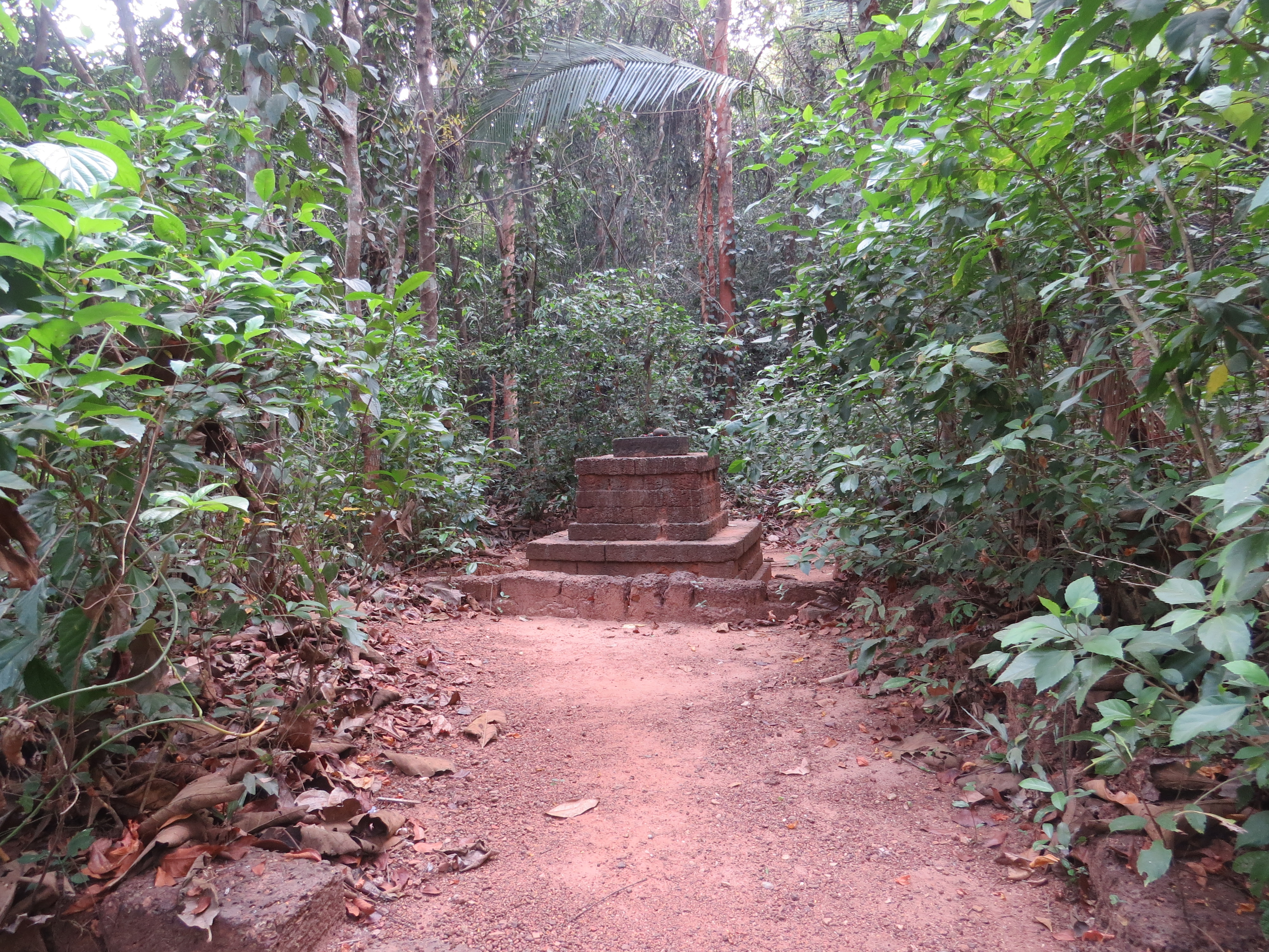 Views from a sarppakkavu at Mayyil, Kannur